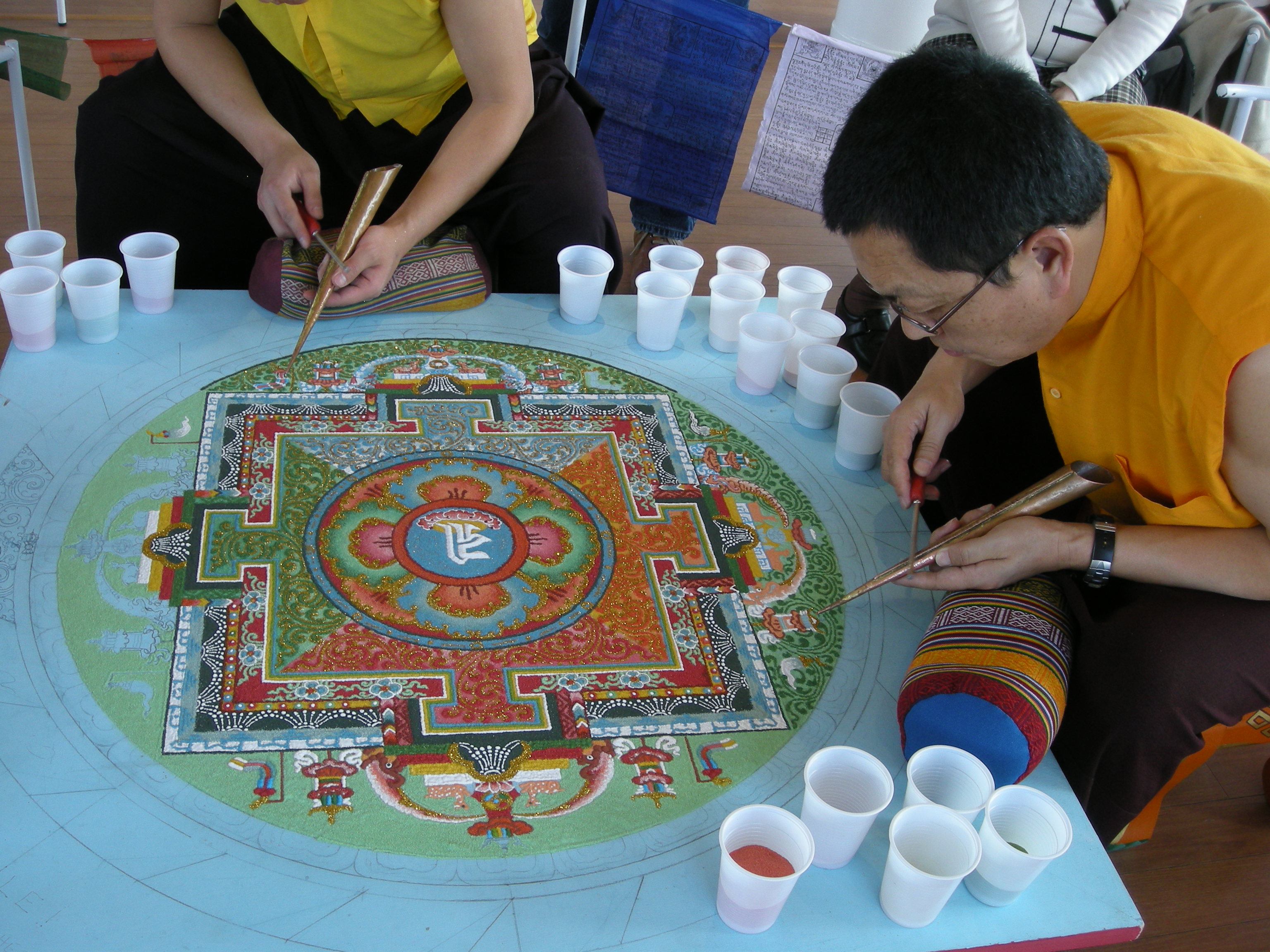 Deuxième jour de la réalisation d'un mandala de sable "Pour la paix dans le monde", par trois lamas du temple des Mille Bouddhas, à la Tour de la Liberté de Saint-Dié-des-Vosges, les 11, 12 et 13 avril 2008